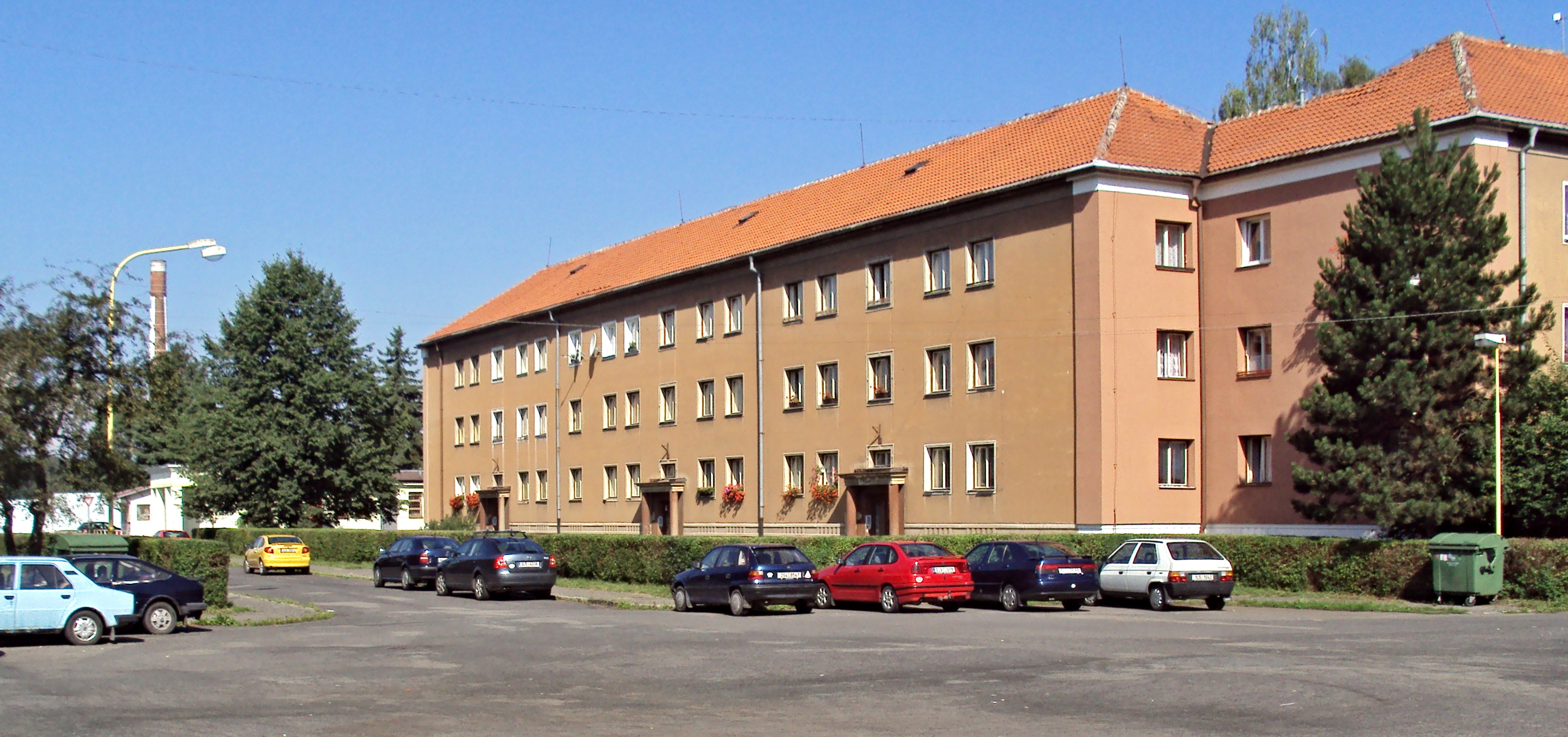 Sídliště ve čtvrti Letná, Mimoň IV